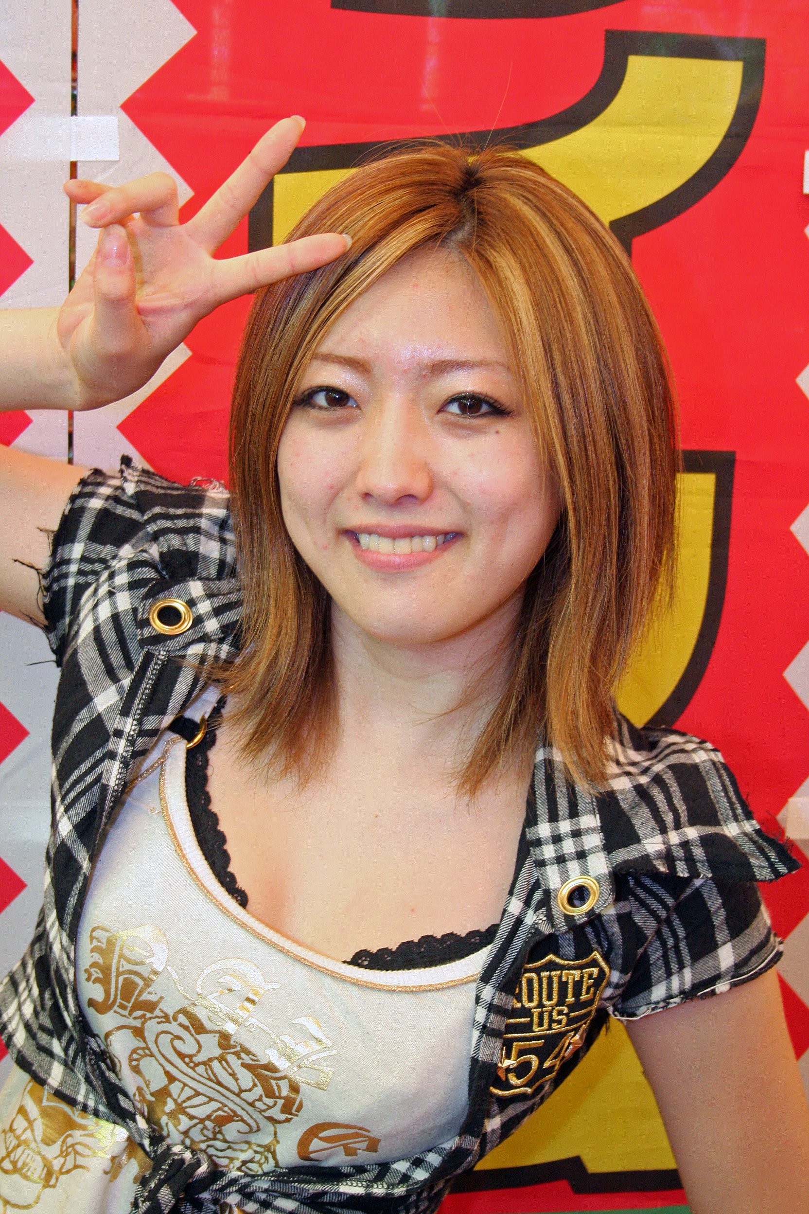 羽田あい。日本のAV女優。兵庫県明石市で開催されたサイン会にて撮影。